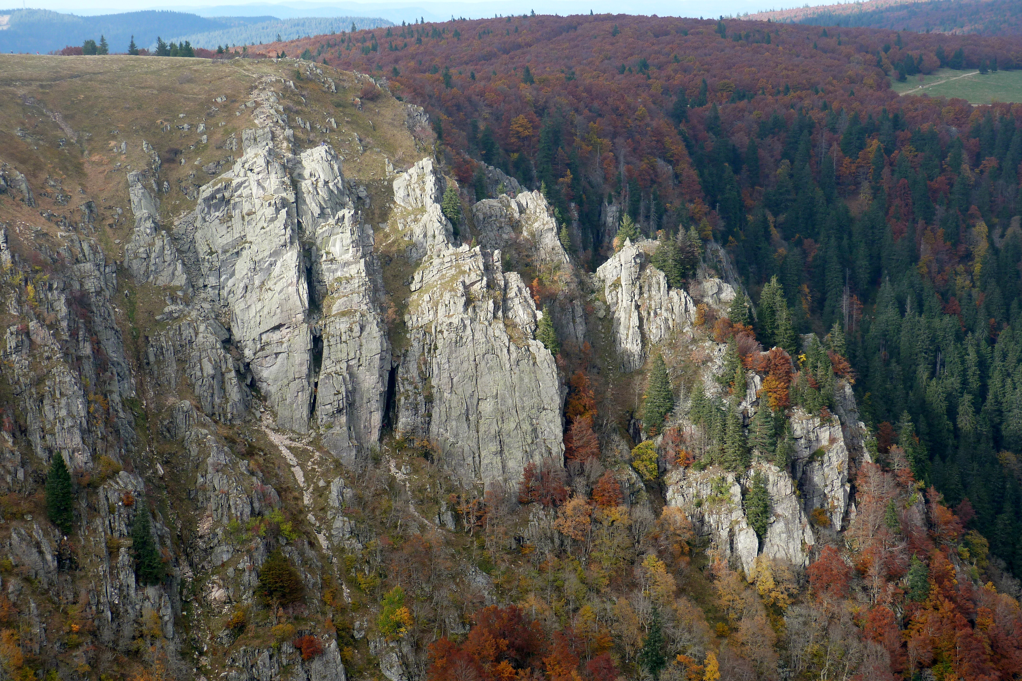 Rochers de la Martinswand dans le massif des Vosges. Site d'escalade réputé.